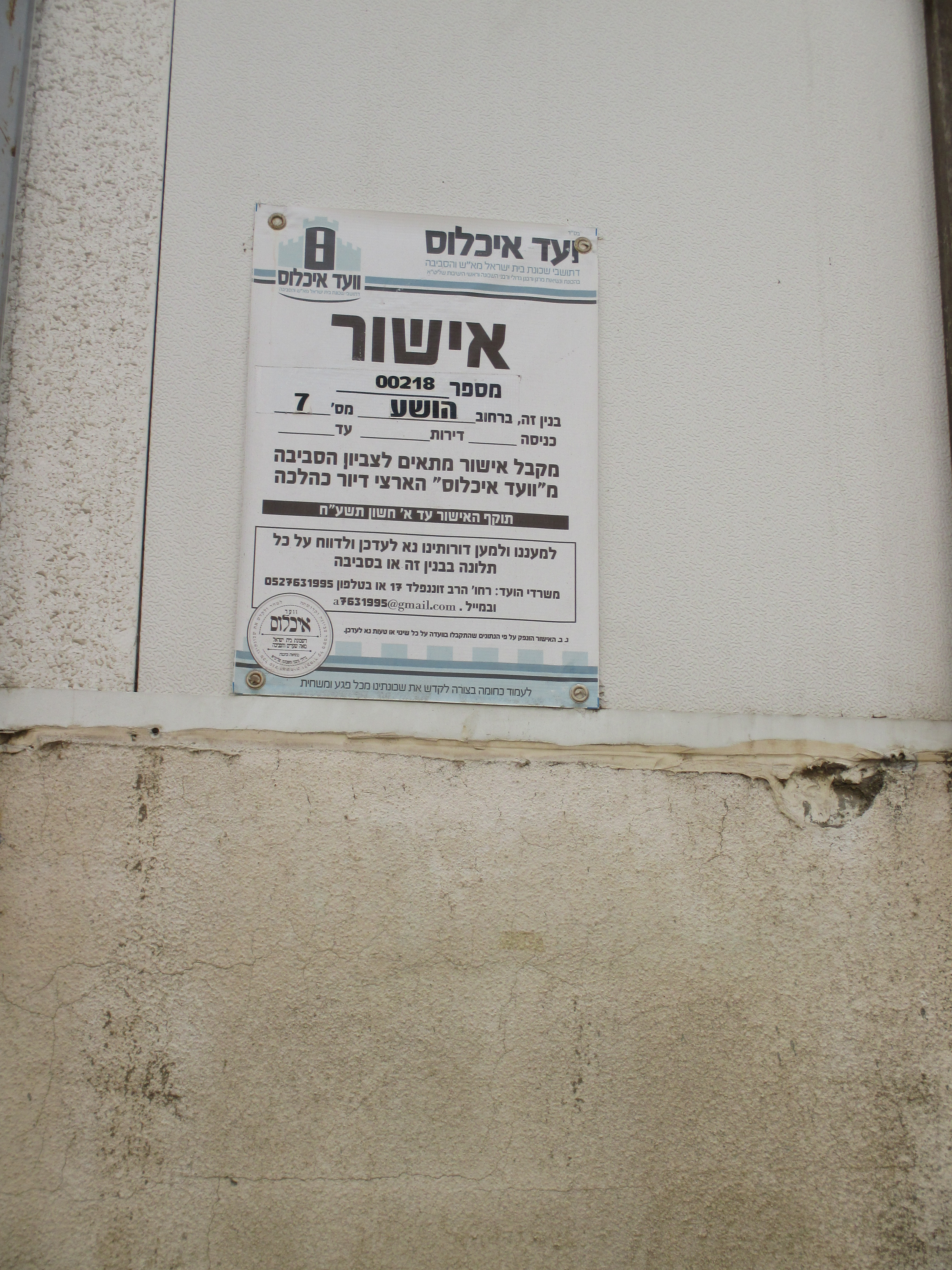 תעודת אישור לבניין בשכונת מאה שערים